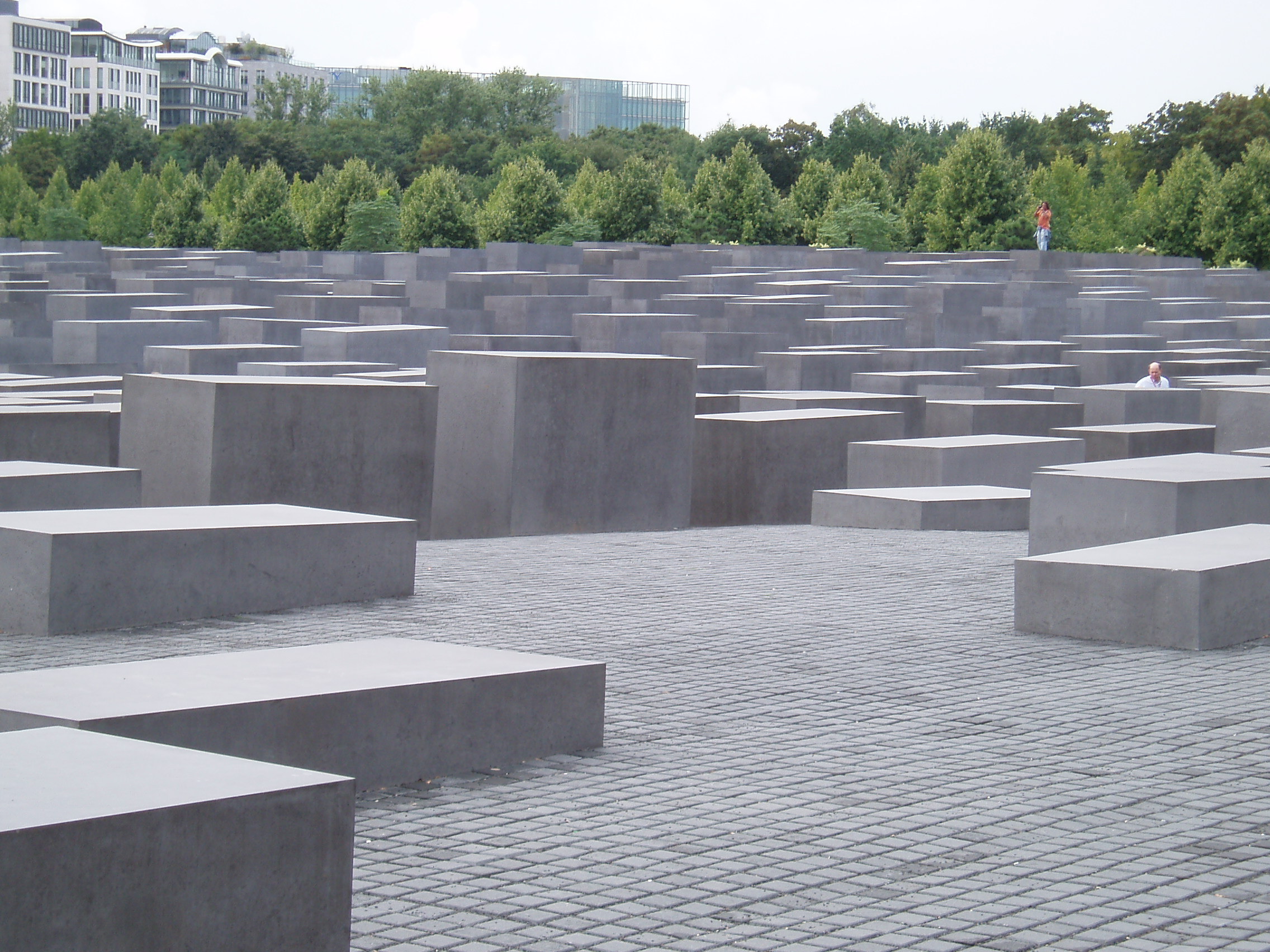 Denkmal für die ermordeten Juden Europas in Berlin